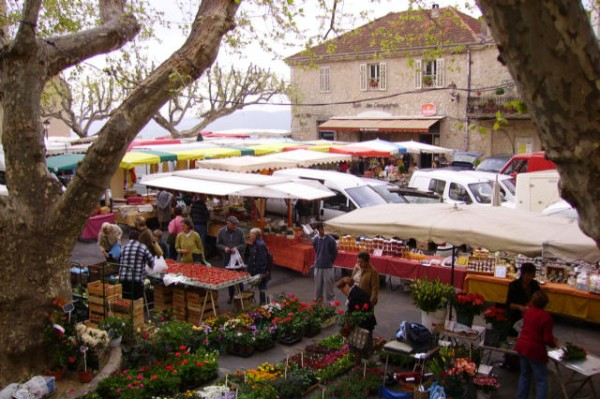 Le marché de Fayence a lieu régulièrement la matinée les mardis, les jeudis et les samedis. Il se trouve place Thiers, nommé aussi place de l'église Saint-Jean Baptiste, c'est à l'est, en haut du centre-ville (carte). On trouve des marchands sur environ 90 étals qui proposent fruits et légumes, produits de producteurs et produits locaux et vêtements, ustensiles, meubles, jouets ou autres produits non-alimentaires. Le nombre d'exposants et les produits proposés sont variables selon la saison, l'information n'est donnée qu'à titre indicatif